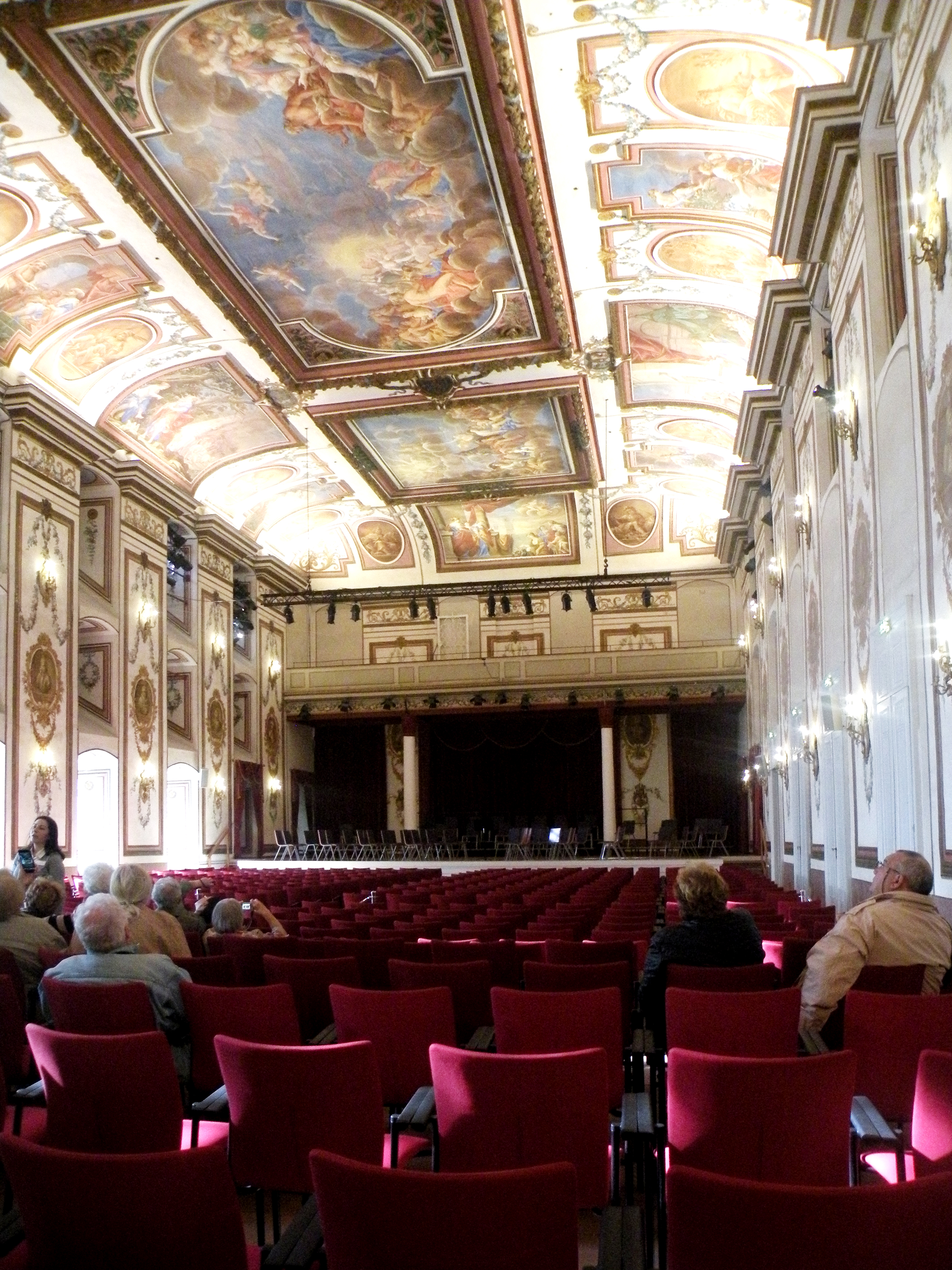 Зал Гайдна